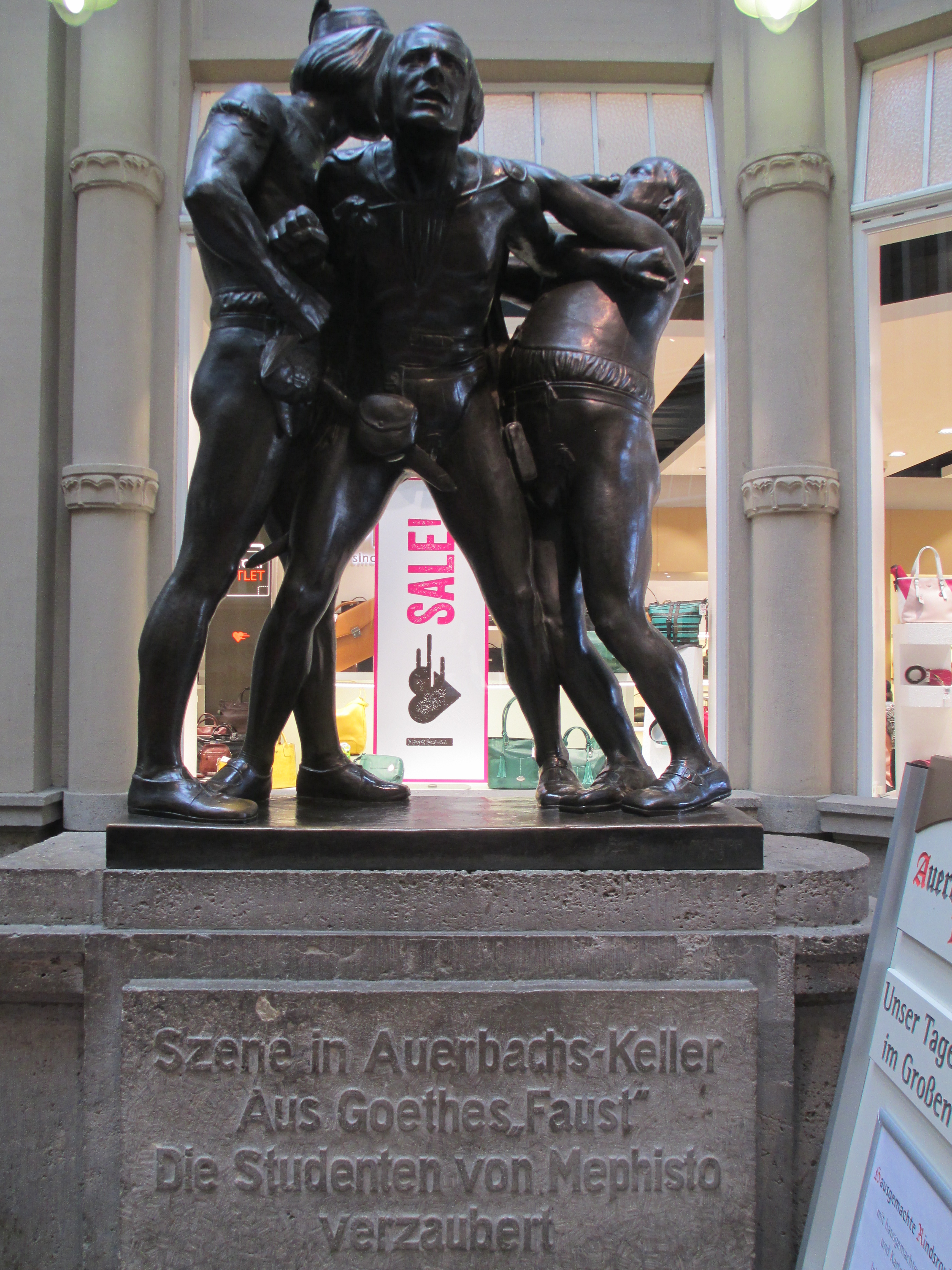 פסל של מפיסטו והסטודנטים במרתף אאורבך בלייפציג